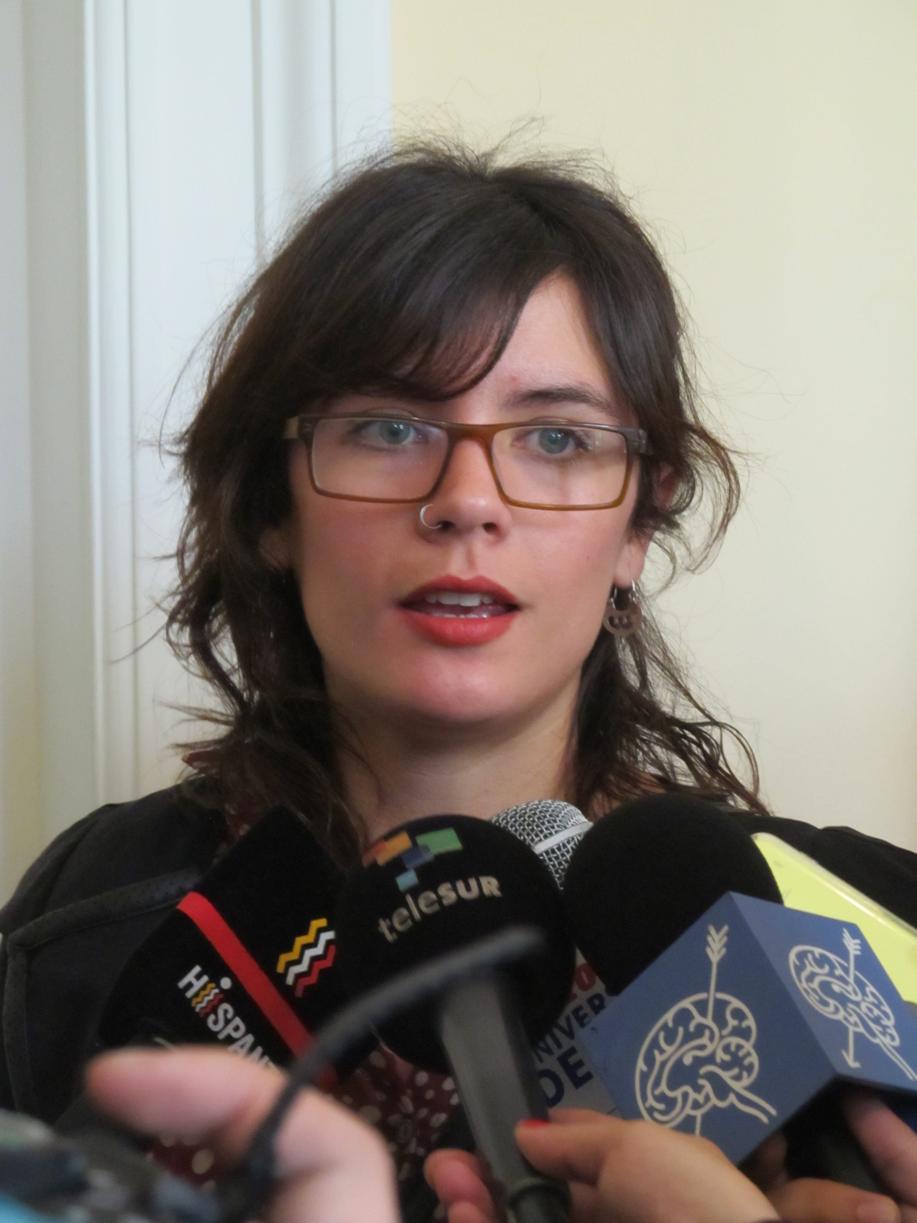 Camila Vallejo entrevistada por prensa.